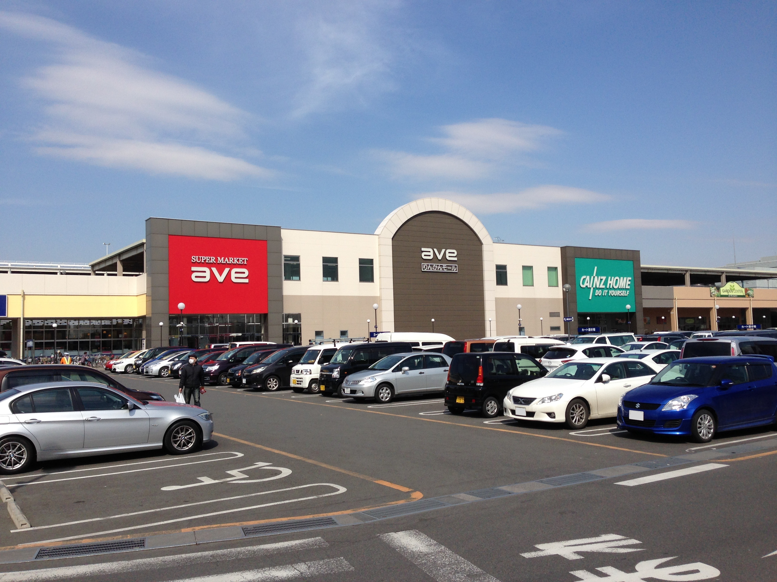 りんかんモール エイビイ棟